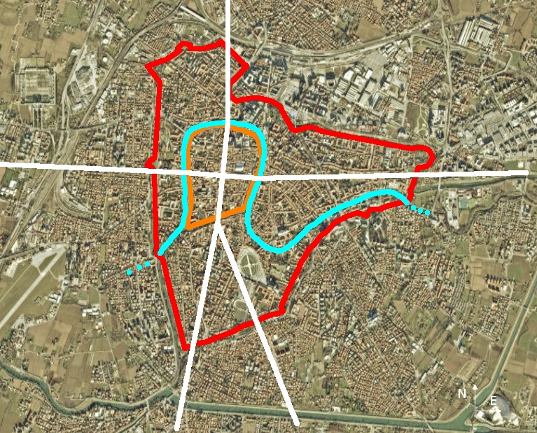 Mappa di Padova antica sovrapposta alla attuale città. In azzurro il corso del Medoacus. In rosso le mura cinquecentesche, in arancione le mura medioevali. In bianco il decumano ed il cardo della città romana e le vie romane che partivano dalla città.